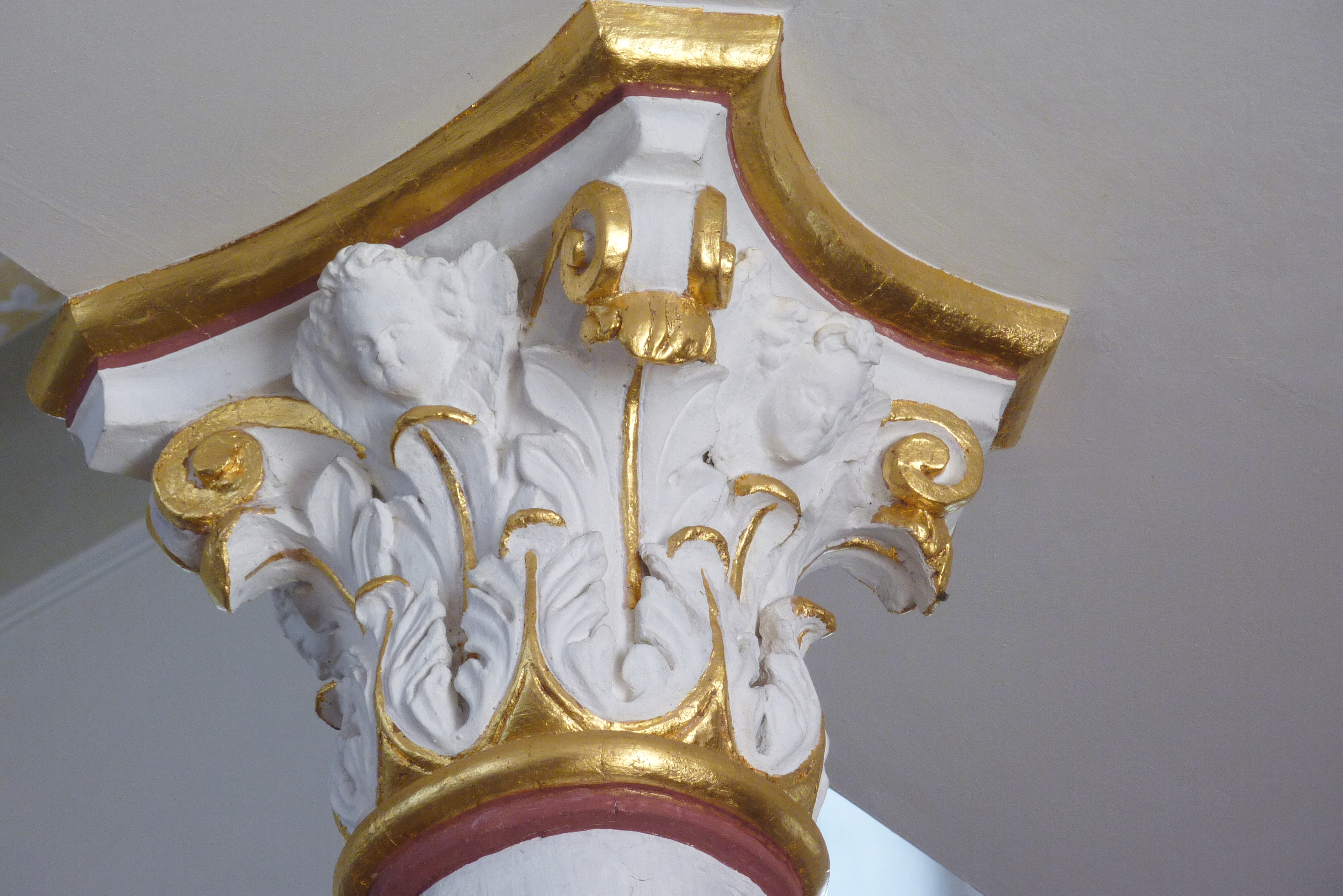 Katholische Pfarrkirche St. Peter und Paul in Ried (Jettingen-Scheppach) im Landkreis Günzburg (Bayern), Kapitell einer Säule unter der Empore